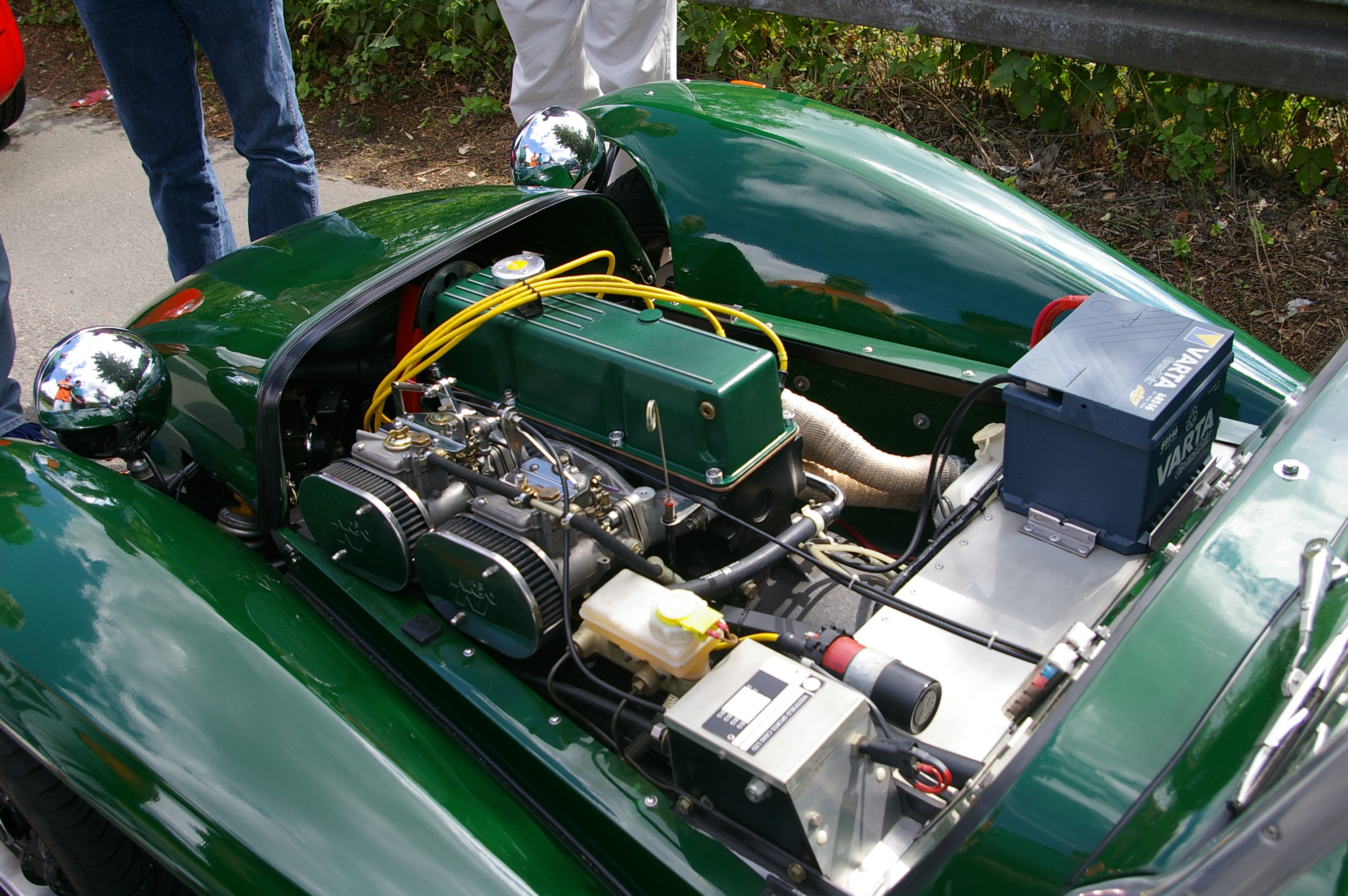 Lotus Seven. Eigenes Foto, August 2006.